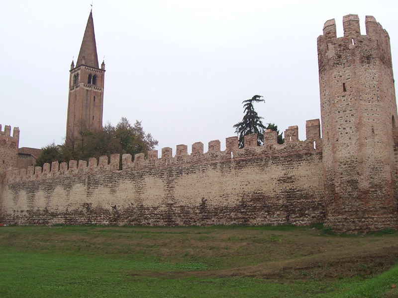 Montagnana - Mura